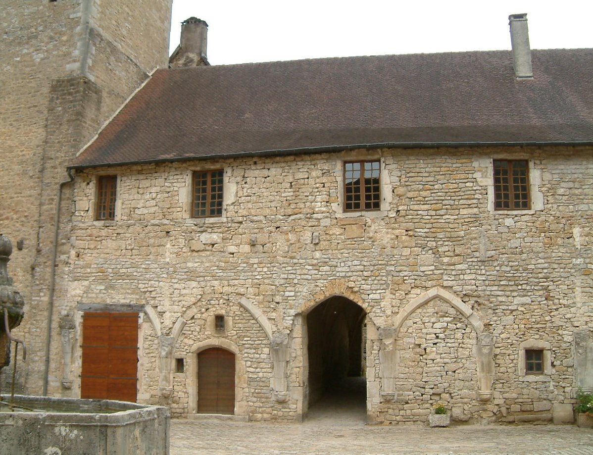 Abbaye de Baume-les-Messieurs, Baume-les-Messieurs, Franche-Comté, FRANCE